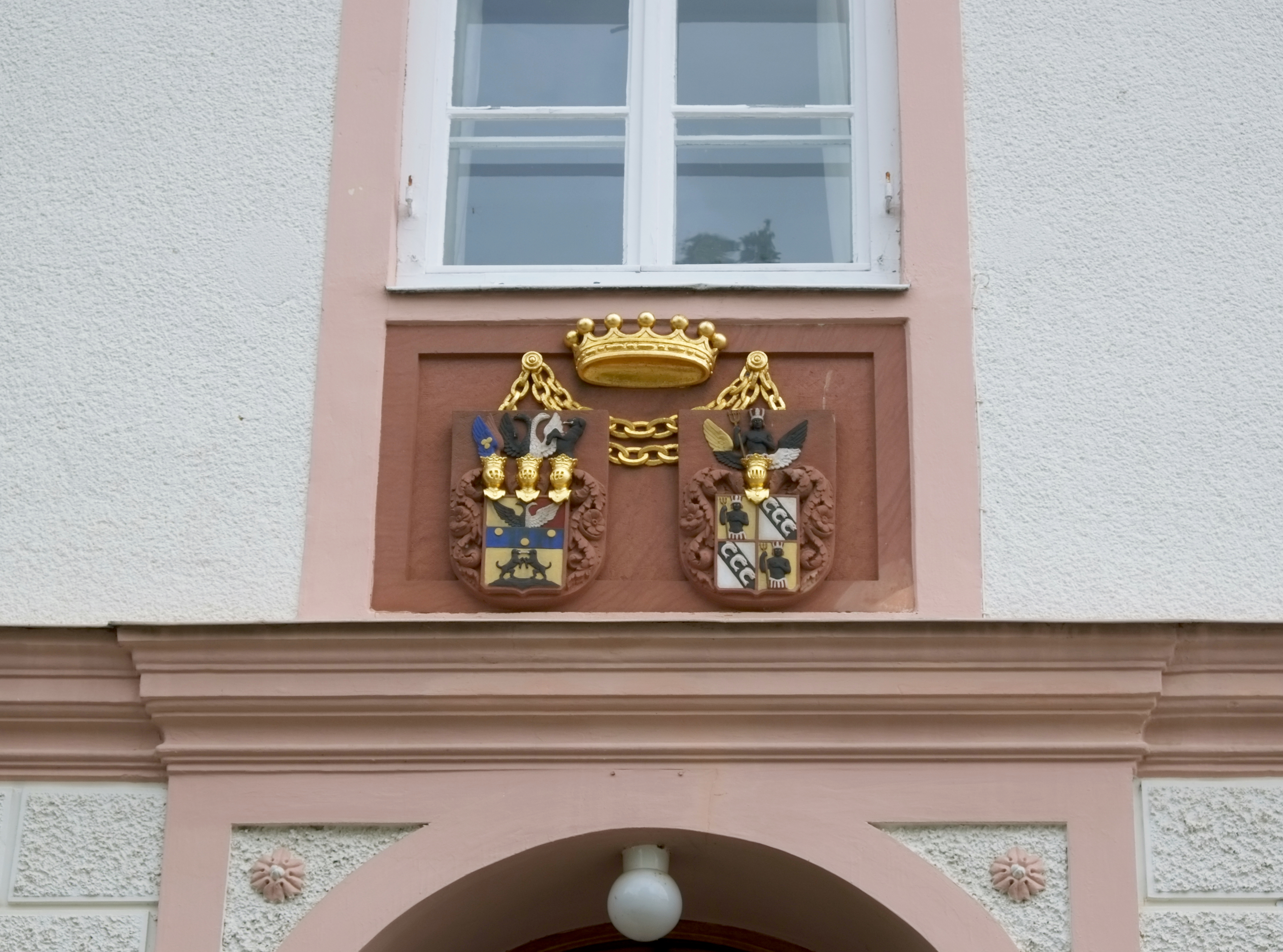 Schloss in Ettelried, einem Ortsteil von Dinkelscherben im Landkreis Augsburg (Bayern), Allianzwappen Schnurbein-Schwarz